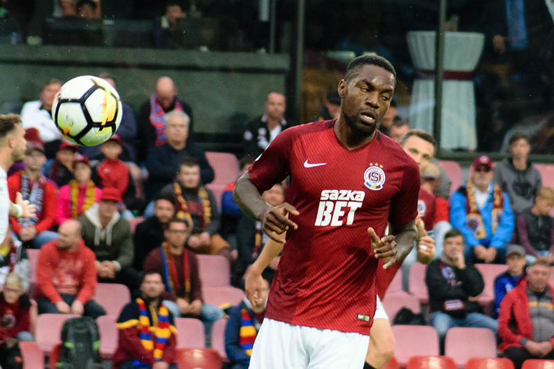 Georges Mandjeck